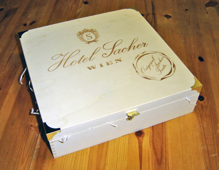 Sachertaartekëscht